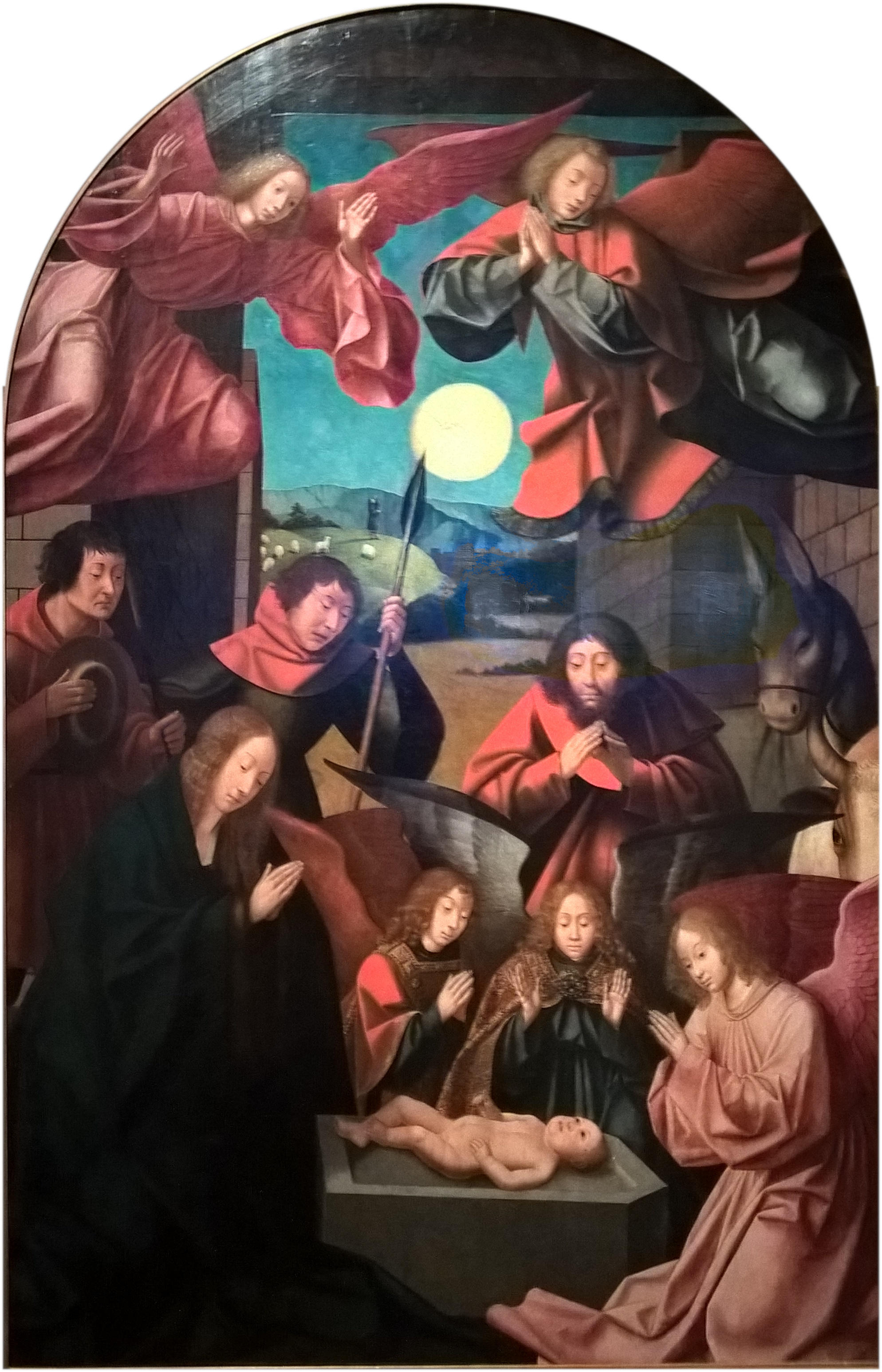 Natividade, painel central do Tríptico da Capela dos Reis Magos, da Igreja Matriz da Ribeira Brava, na Madeira, atribuido ao Mestre do Tríptico de Morrison MASF